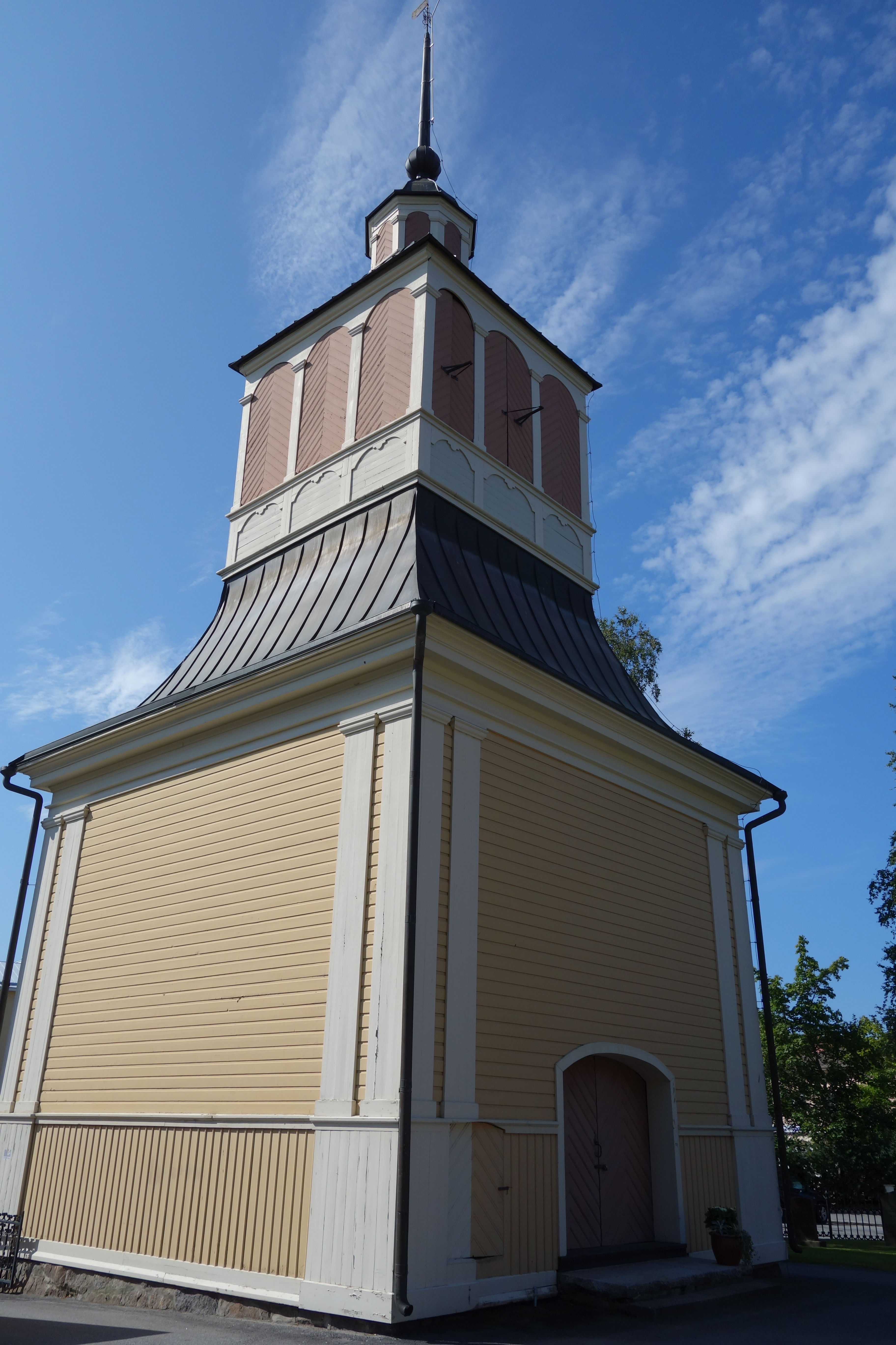 Byggdes år 1742 av vöråbon Hinderic Kattil.